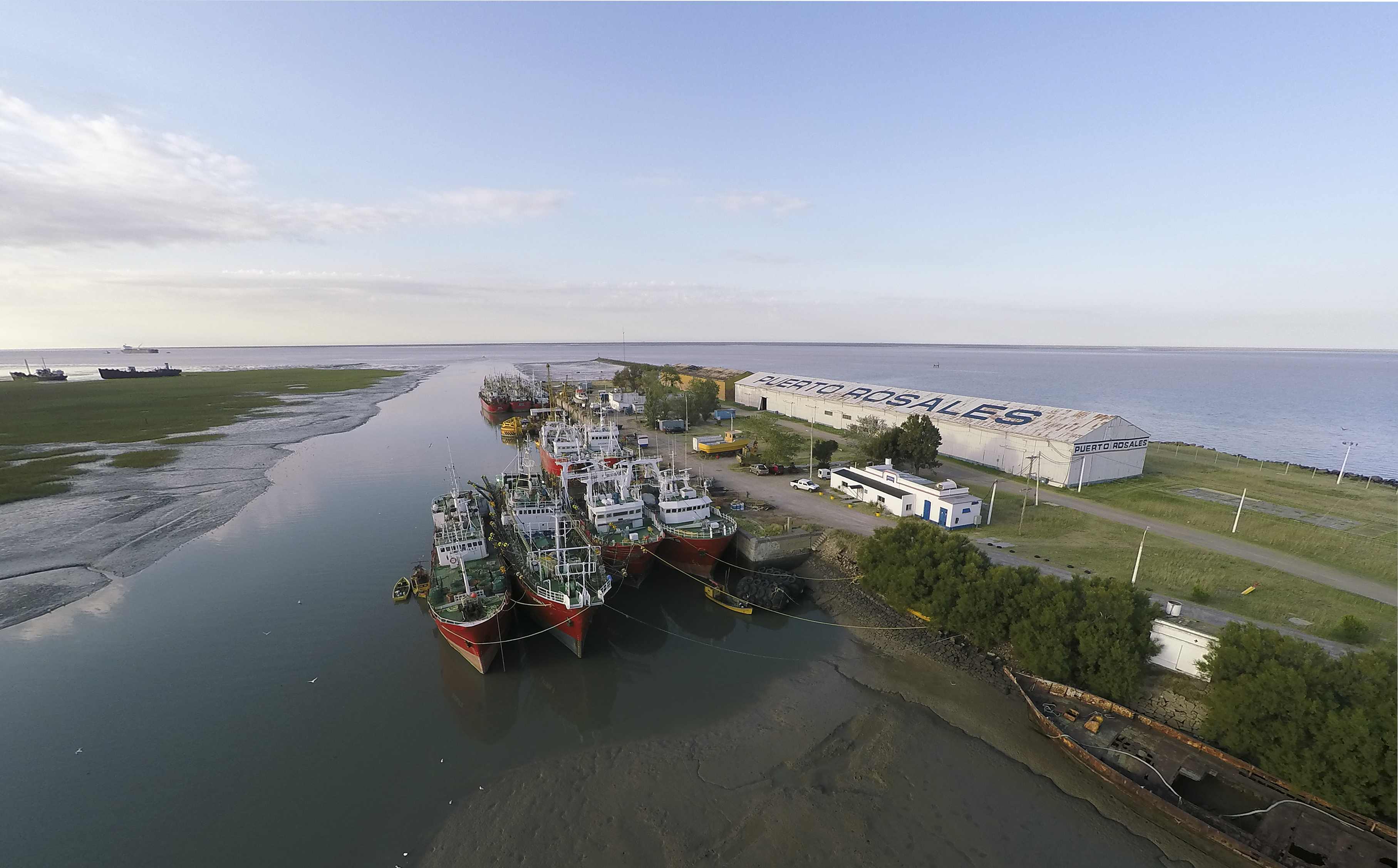 Vista aérea del muelle de Puerto Rosales (Foto: Maurucio Clermont)